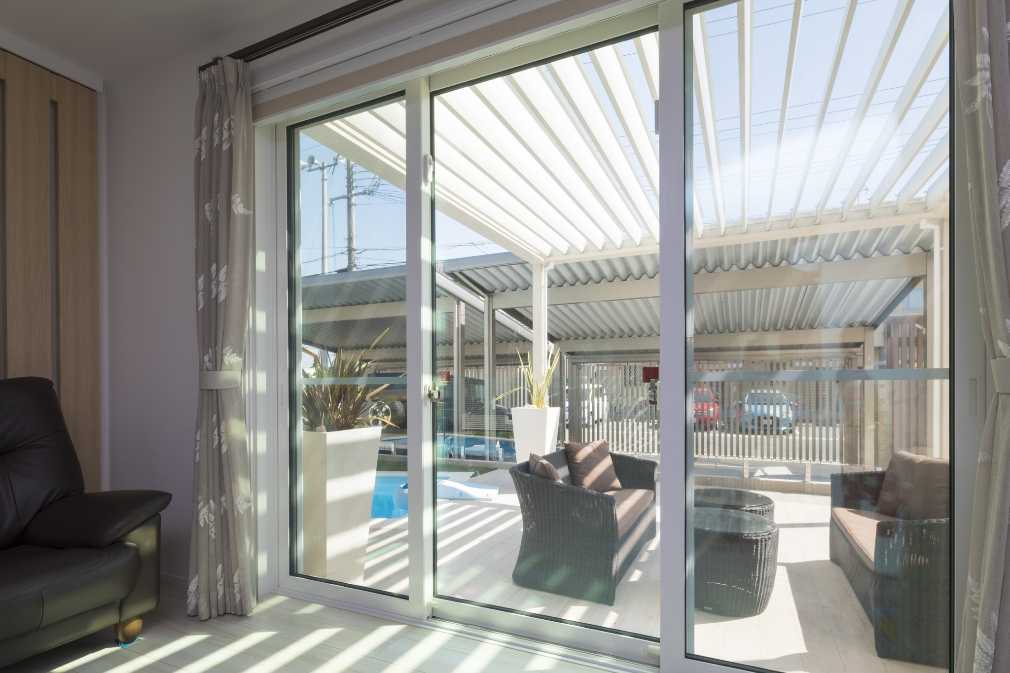 Outdoor living アウトドアリビング設置例 contractor.： Himawari Life Co., Ltd.（ひまわりライフ）